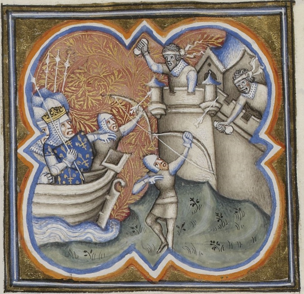 Philippe Auguste assiège Acre durant la troisième croisade. Enluminure des Grandes Chroniques de France, XIVe siècle. Paris, Bibliothèque nationale de France, Département des manuscrits, Français 2813, folio 237 recto.